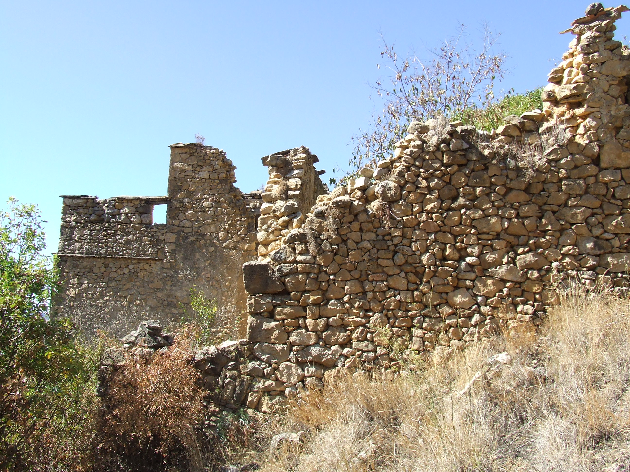 Cal Miquelet (Abella de la Conca, Pallars Jussà)